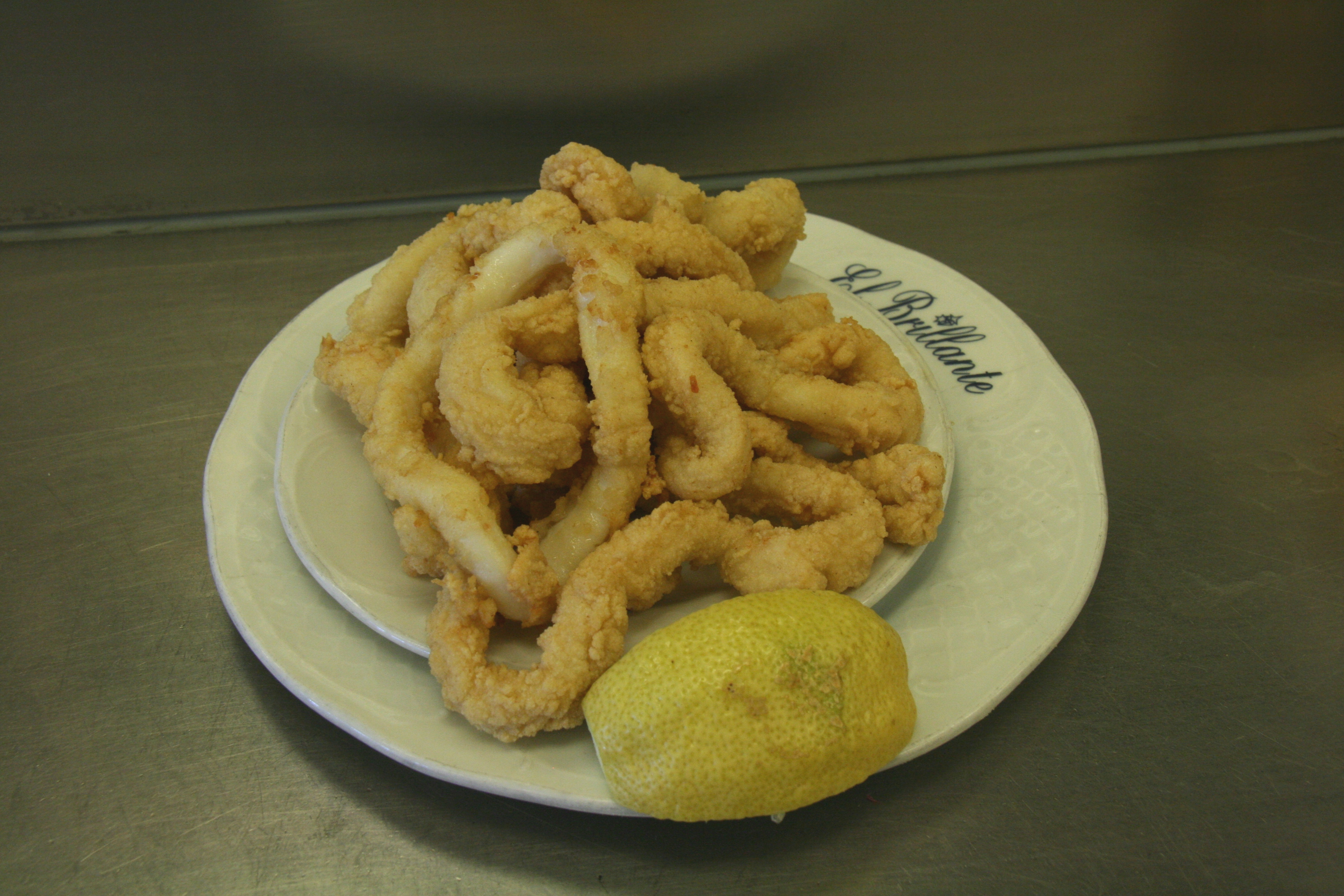 Ración de Calamares - Madrid (El Brillante)